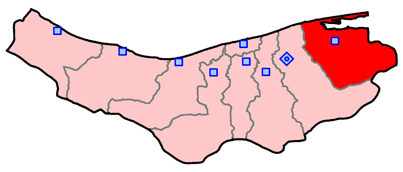 حوزهٔ انتخاباتی بهشهر، نکا و گلوگاه برای انتخابات مجلس شورای اسلامی